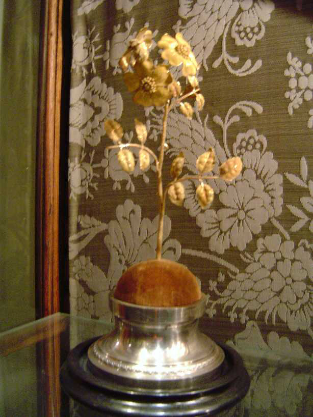 Englantina d'or, formada per una tija central de la qual surten dues primes tiges de cinc fulles cadascuna i tres flors al marge superior, de cinc pètals cadascuna. Aquesta és clavada a una coixinet hemisfèric de fusta cobert per vellut, la qual remata una base acampanada de plata amb inscripcions. Aquest és sobre un plat circular de fusta. Datada el 1859